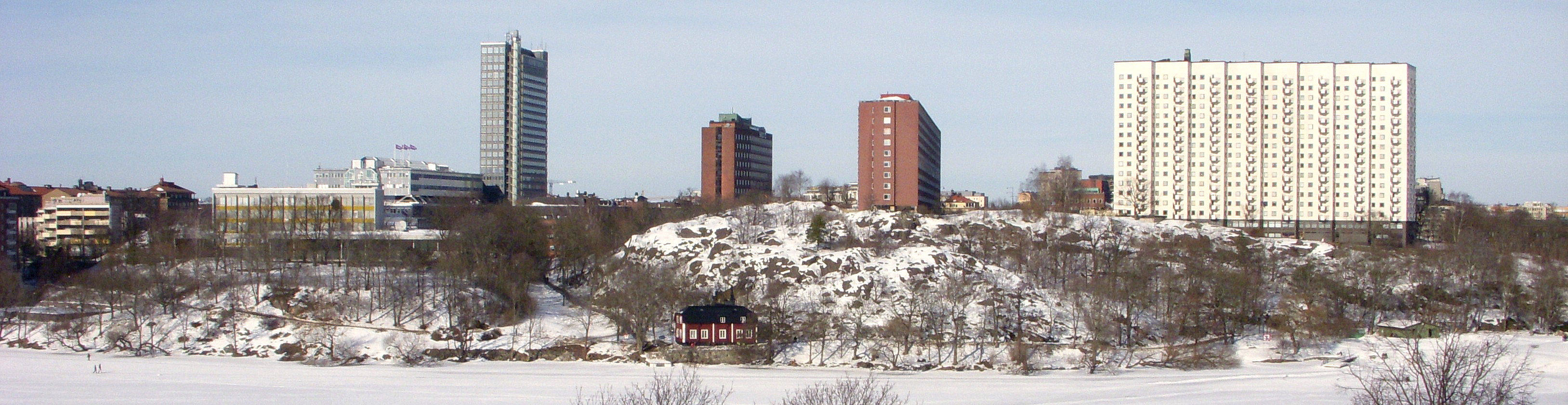 Marieberg i Stockholm, sett från Långholmen